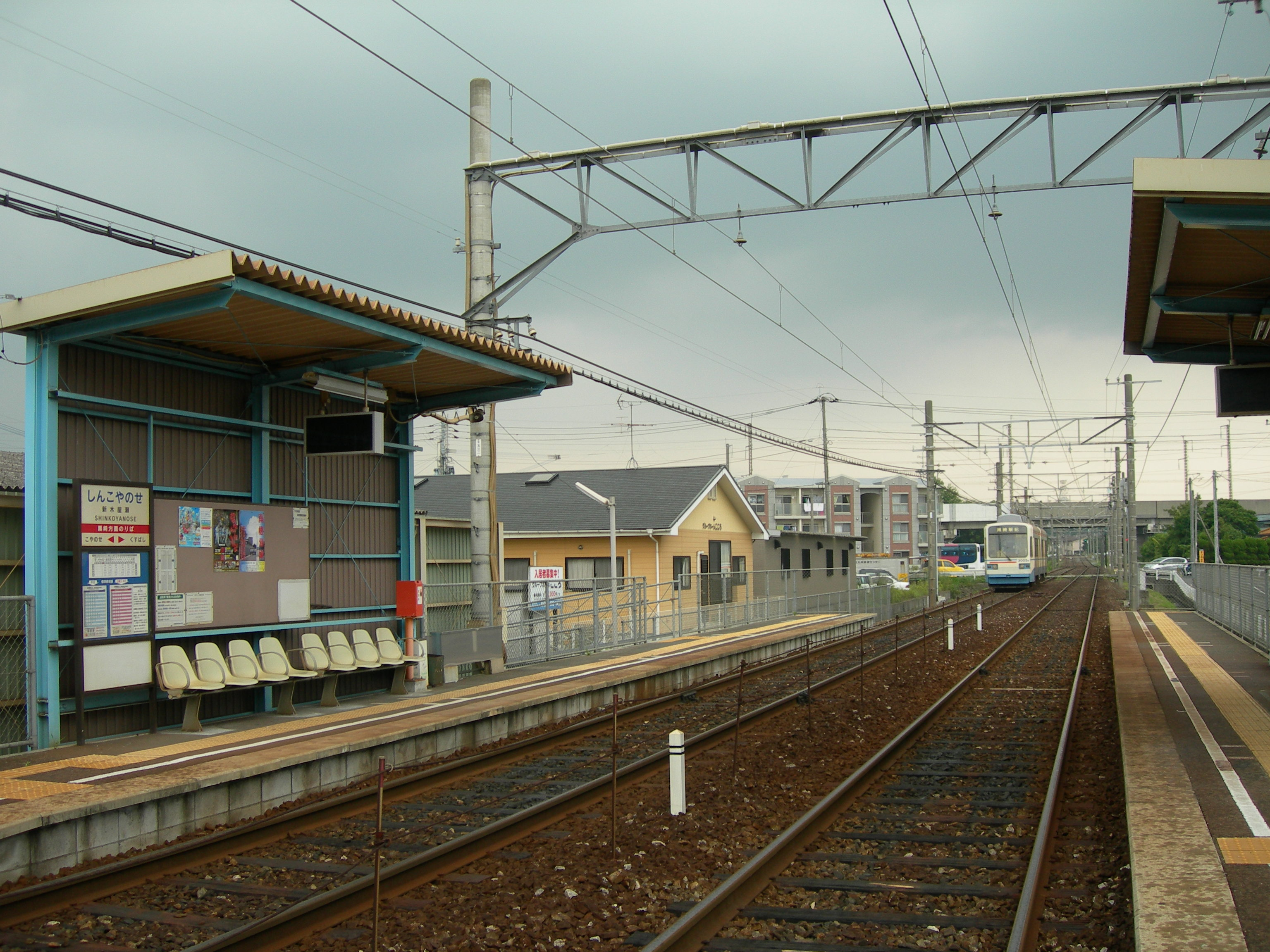 新木屋瀬駅